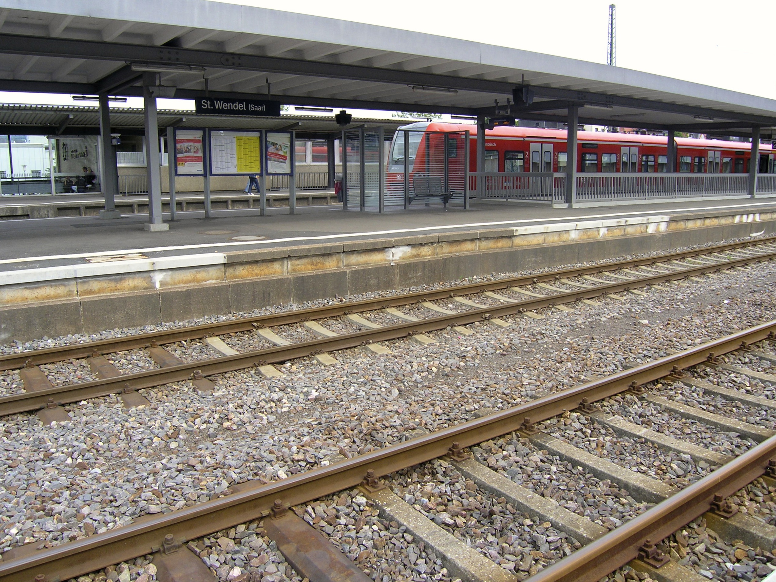 Bahnhof St. Wendel, gleisseitig.